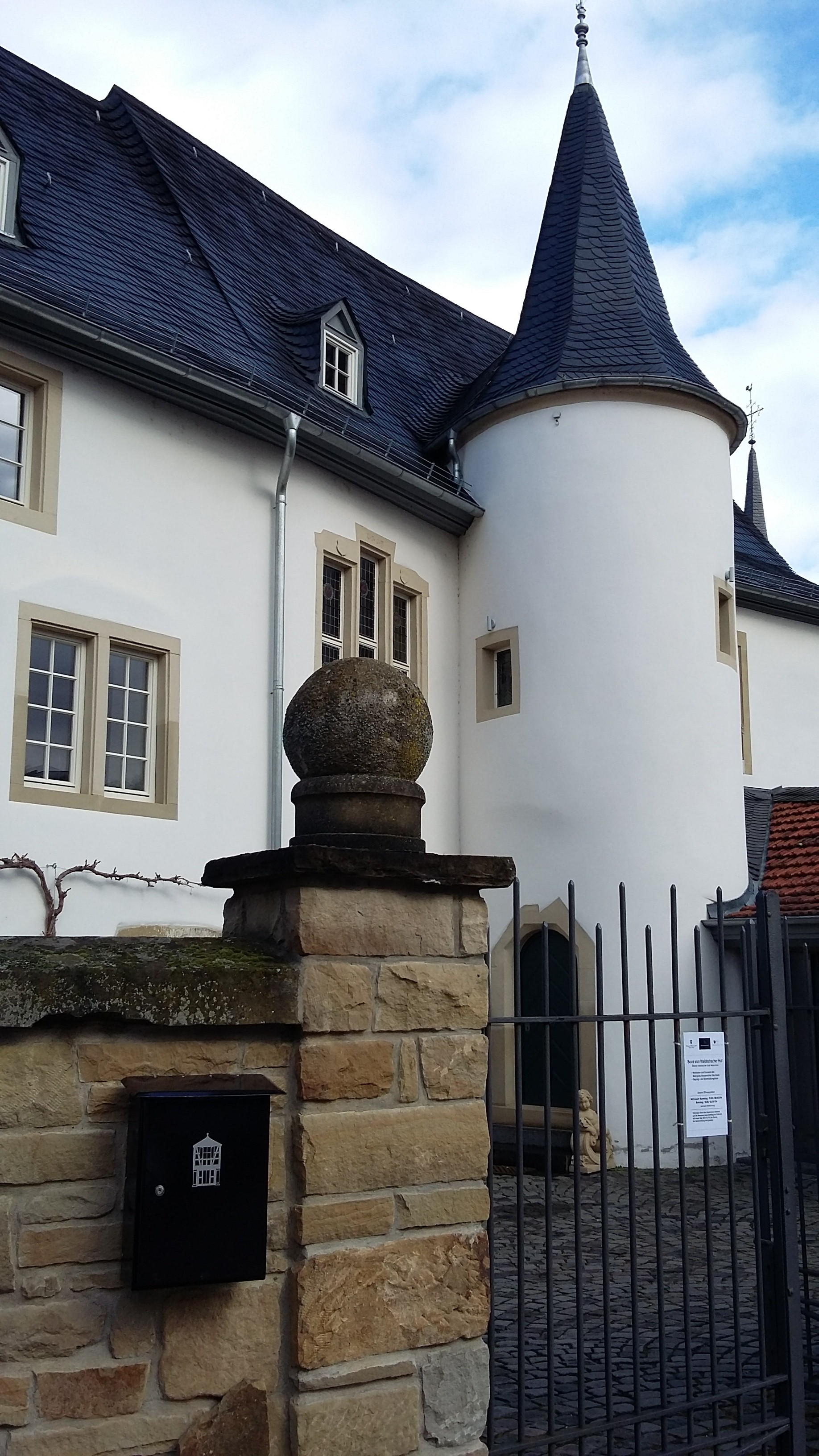 Boos von Waldeckscher Hof, 2017